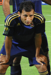 سيد معوض